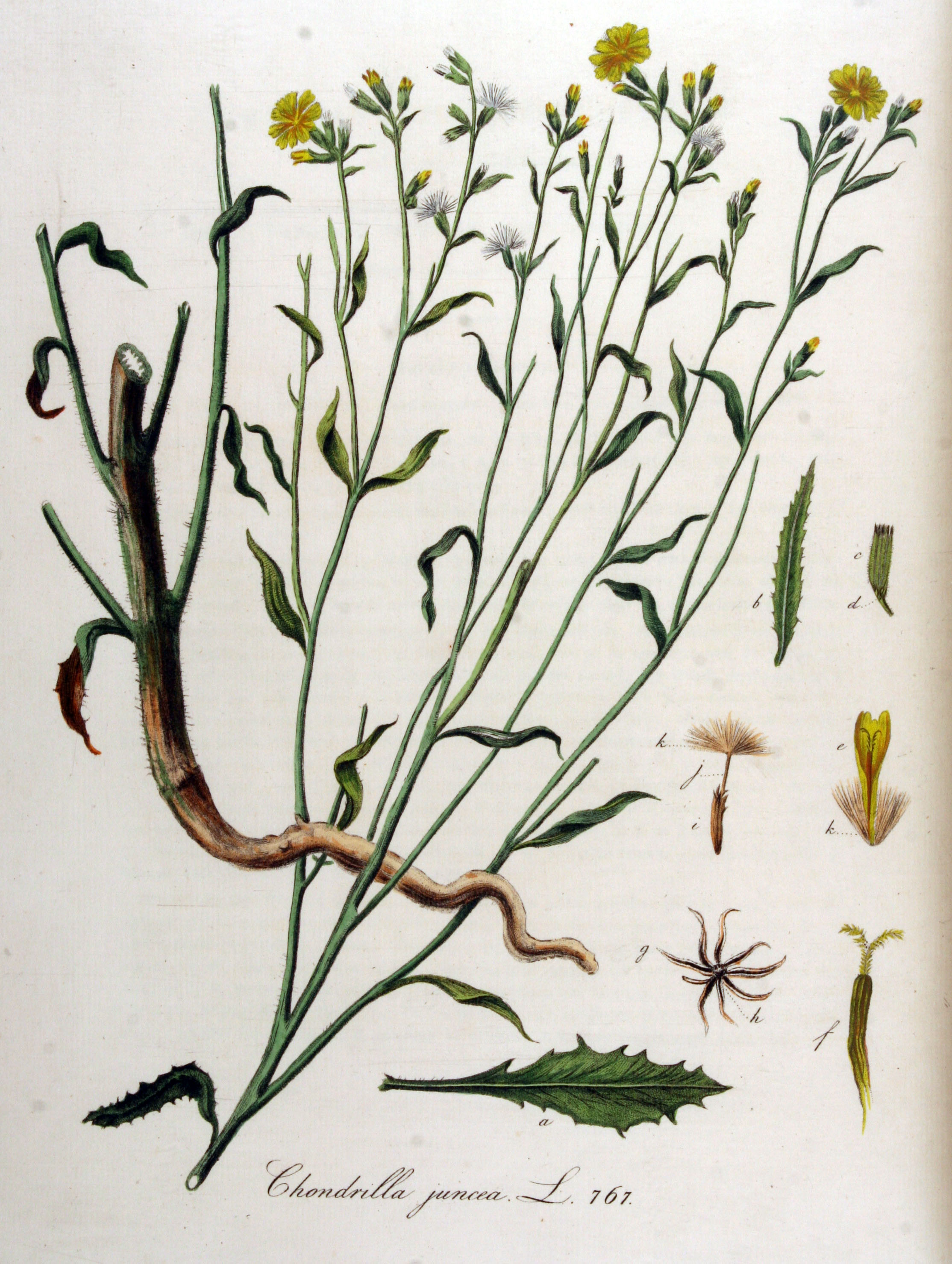 Chondrilla juncea L.